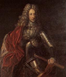 painting